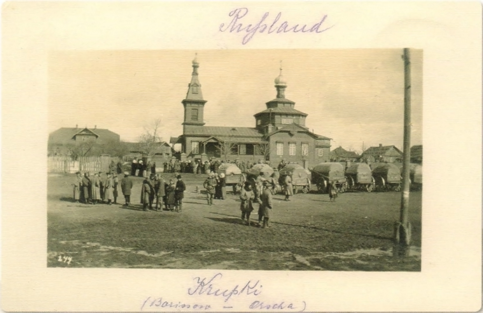 Беларуская (тарашкевіца): Крупкі (Krupki), пляц Рынак (plac Rynak). Царква